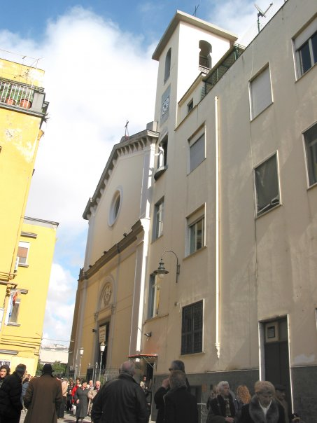 foto della chiesa dell'Immacolata Concezione in Portici (dove abito)